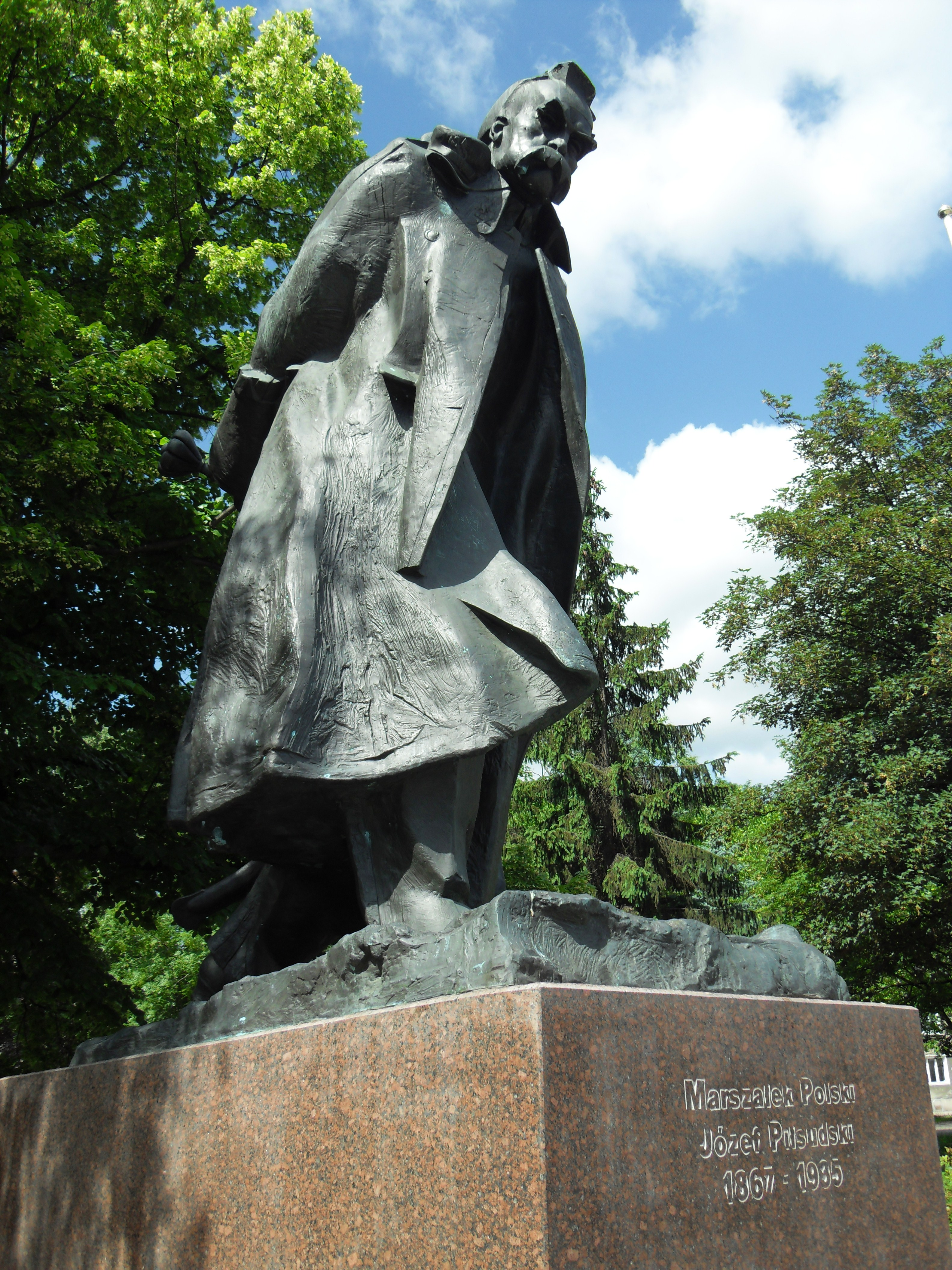 Gdańsk Strzyża, pomnik Józefa Piłsudskiego.